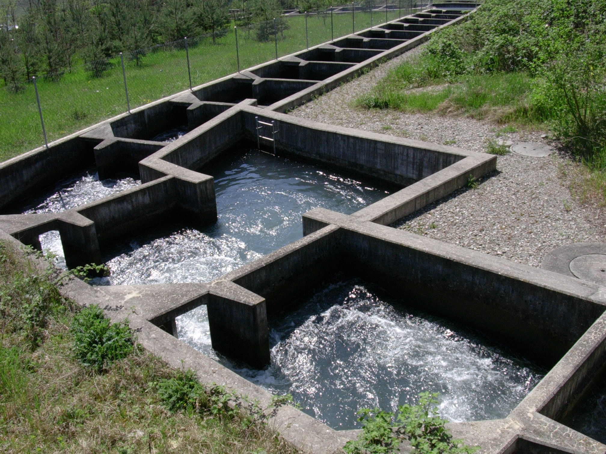 L'échelle à poisson au barrage de Verbois